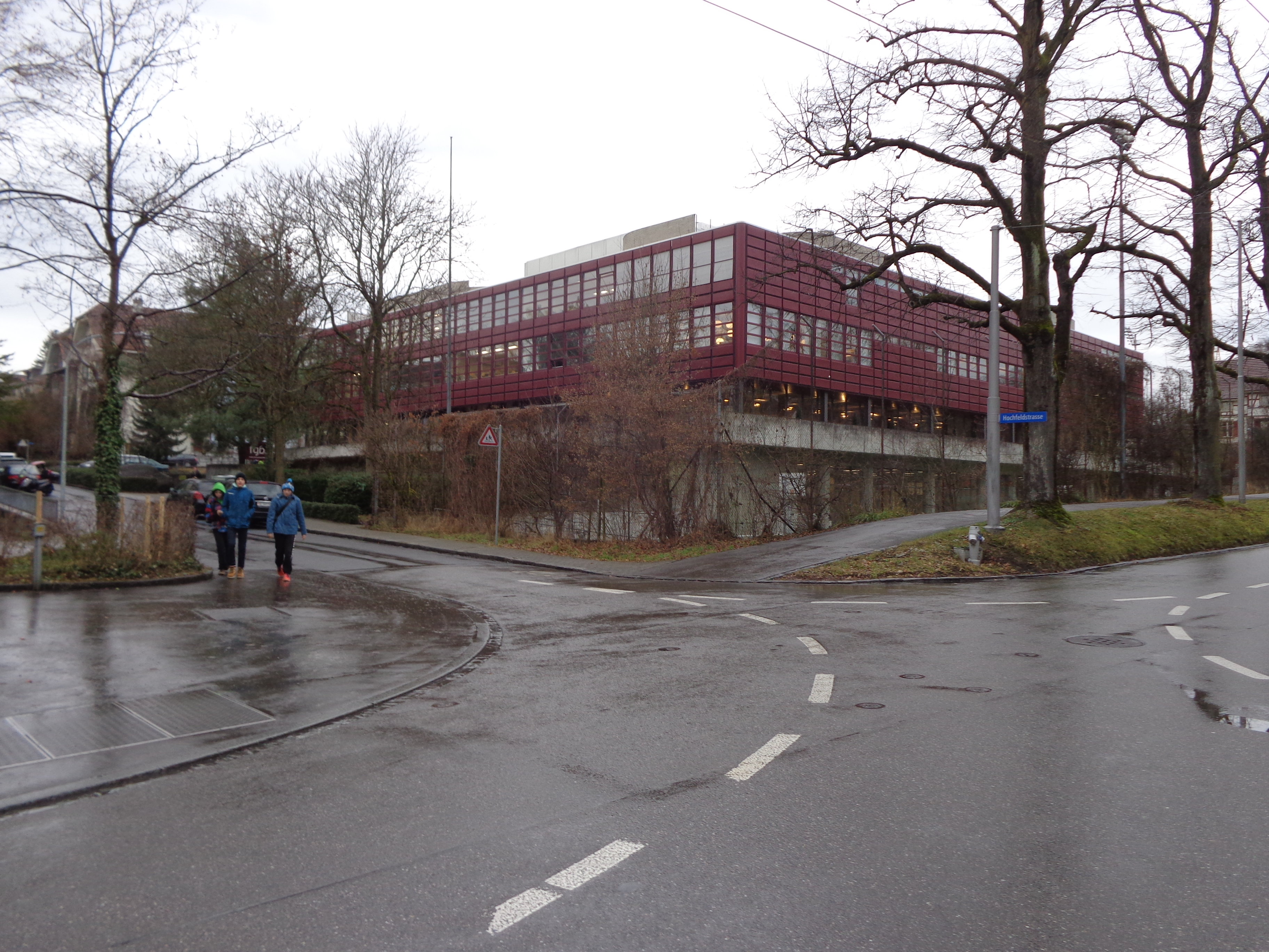 Freies Gymnasium Bern, Südansicht des Gebäudes.